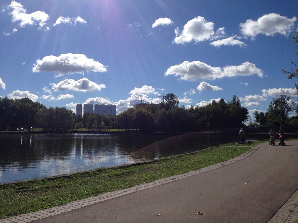 Афонинский Пруд (Вид на Южную часть)